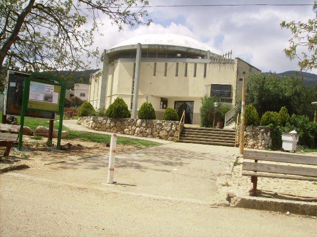 בית הכנסת במושב מירון